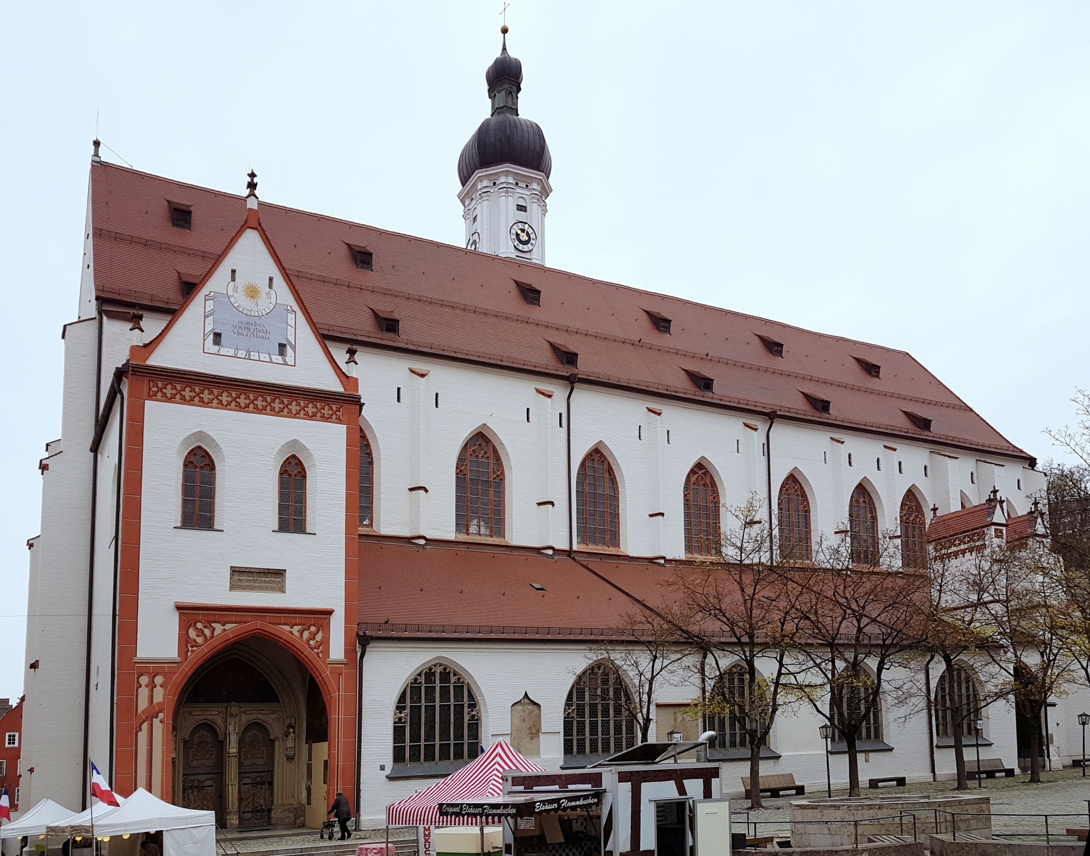 Mariä Himmelfahrt (Landsberg am Lech), Ansicht von Südwesten